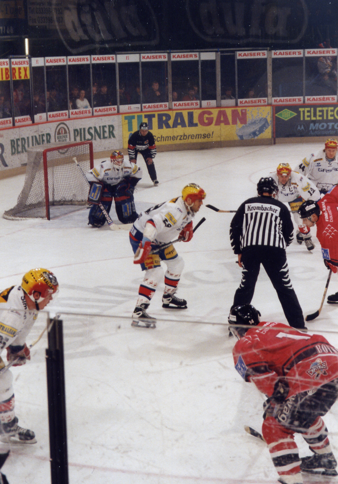 Aufstellung zum Bully im Spiel Eisbären Berlin - Berlin Capitals, 1997 Source: self taken by David Herrmann, 1997 in Berlin